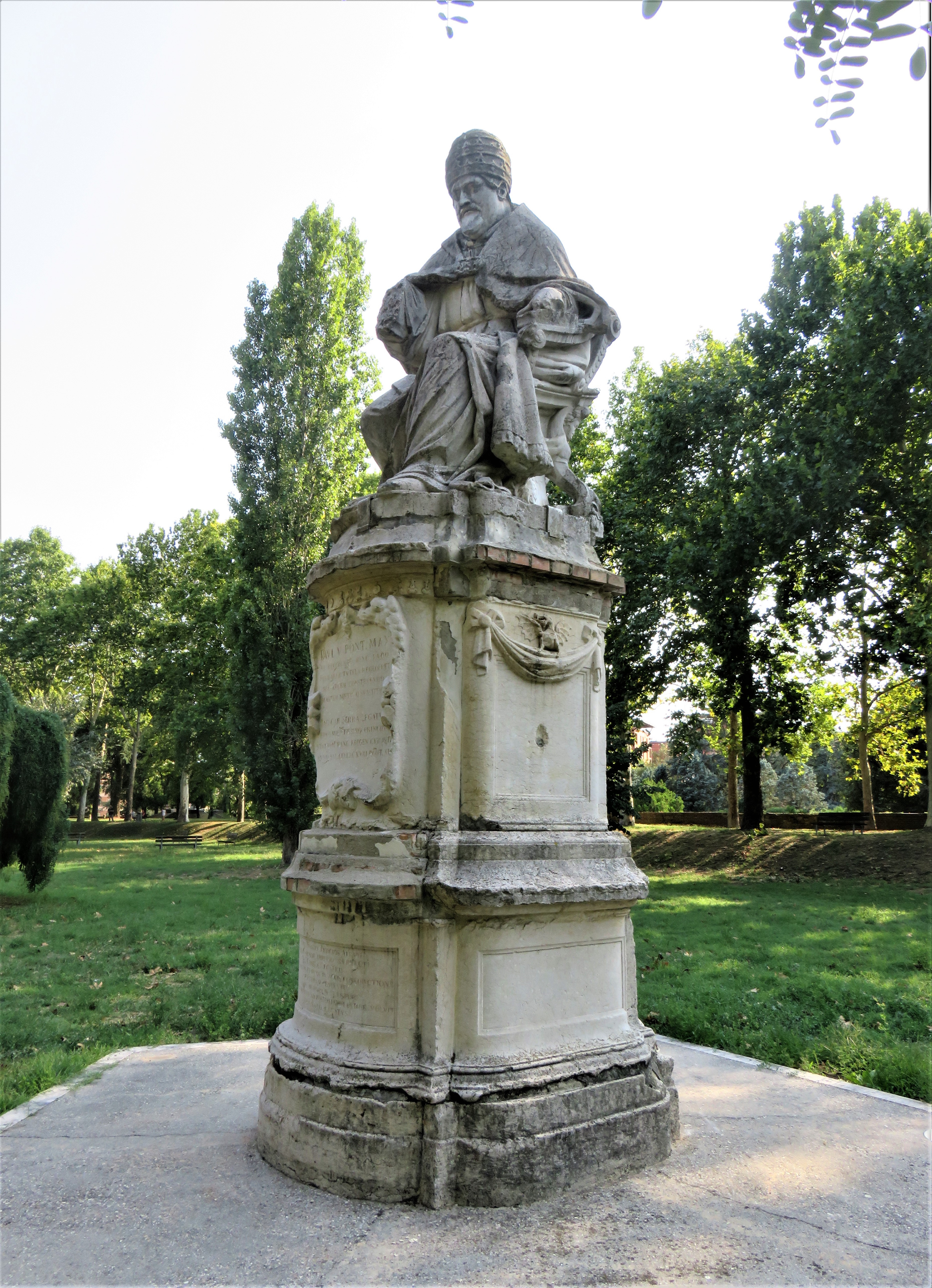 Statua di Papa Paolo V a Ferrara nell'area della ex Fortezza